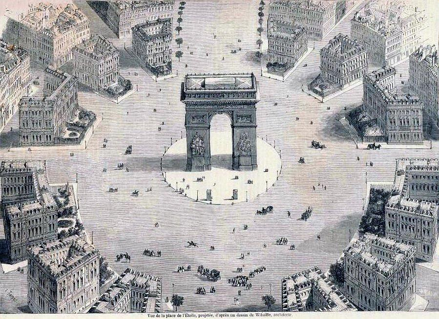 La place de l'étoile en 1857